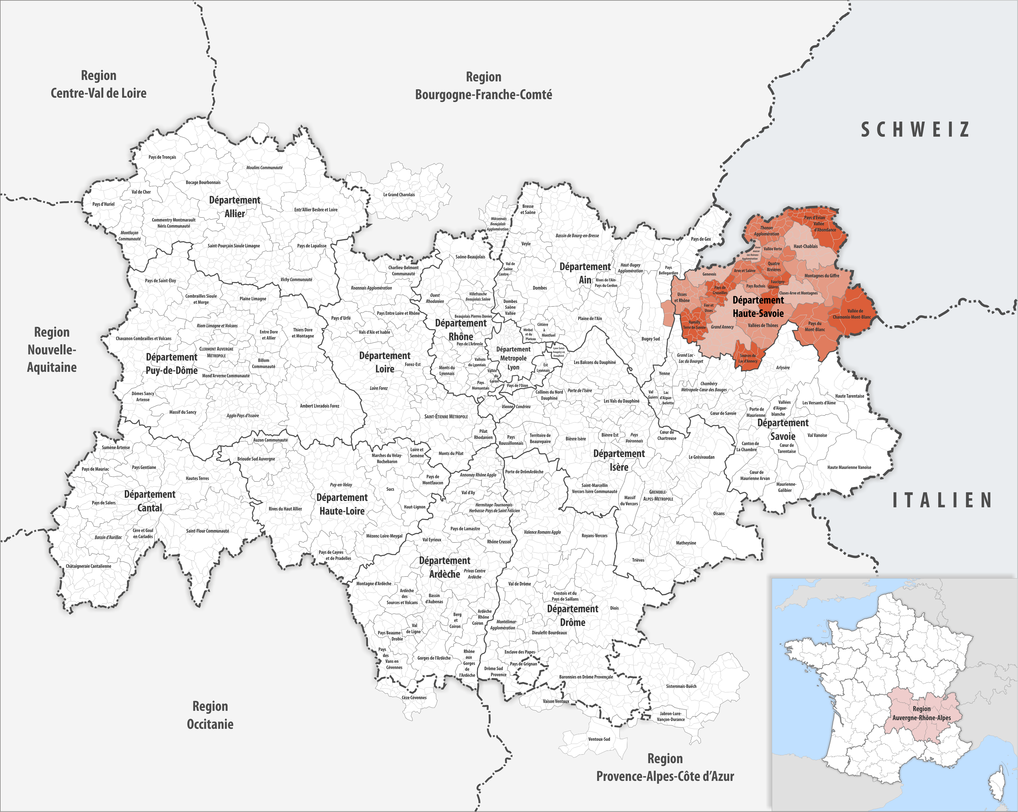 Gemeindeverbände im Département Haute-Savoie